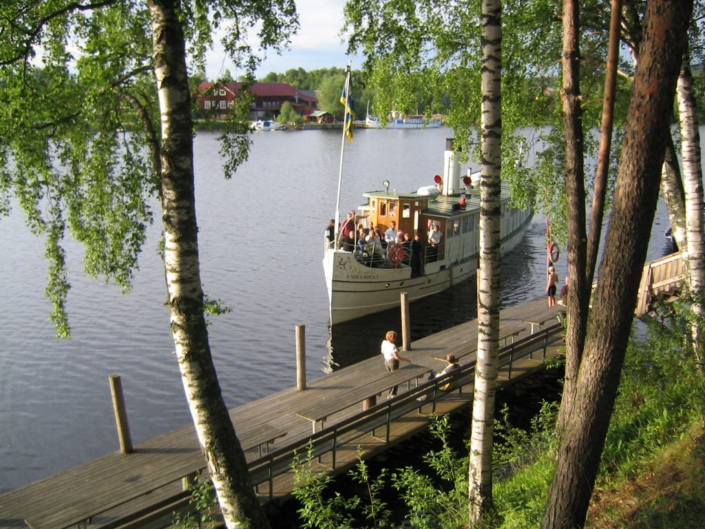 S/S Engelbrekt lägger till bryggan vid Övermo bystuga